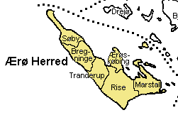 Ærø Herred Svendborg Amt, Denmark. Map by Svend-Erik Christiansen, edited by user:Nico-dk .